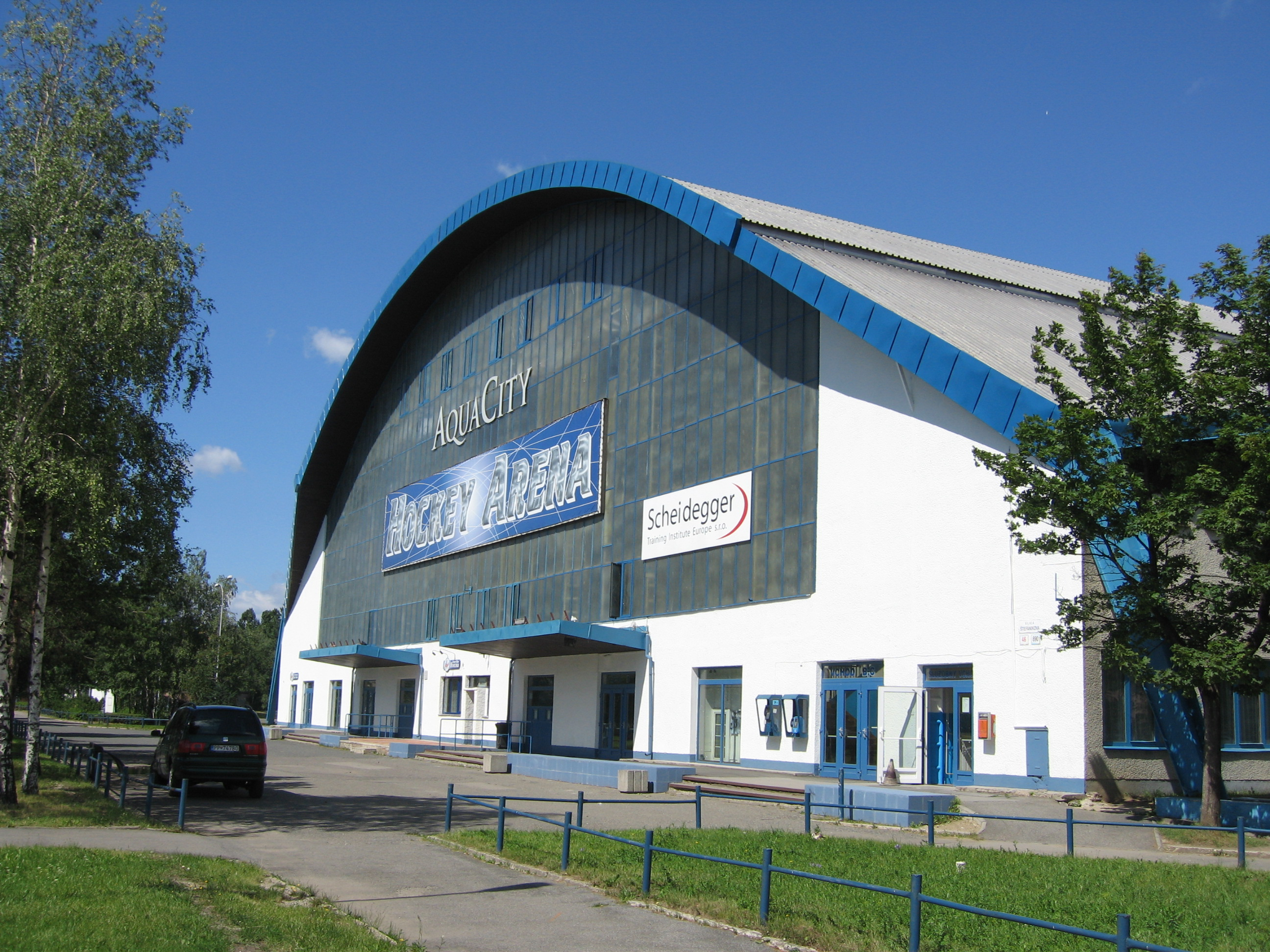 Hockey Arena Poprad, ice hockey venue in Poprad, Slovakia, home of HK Poprad